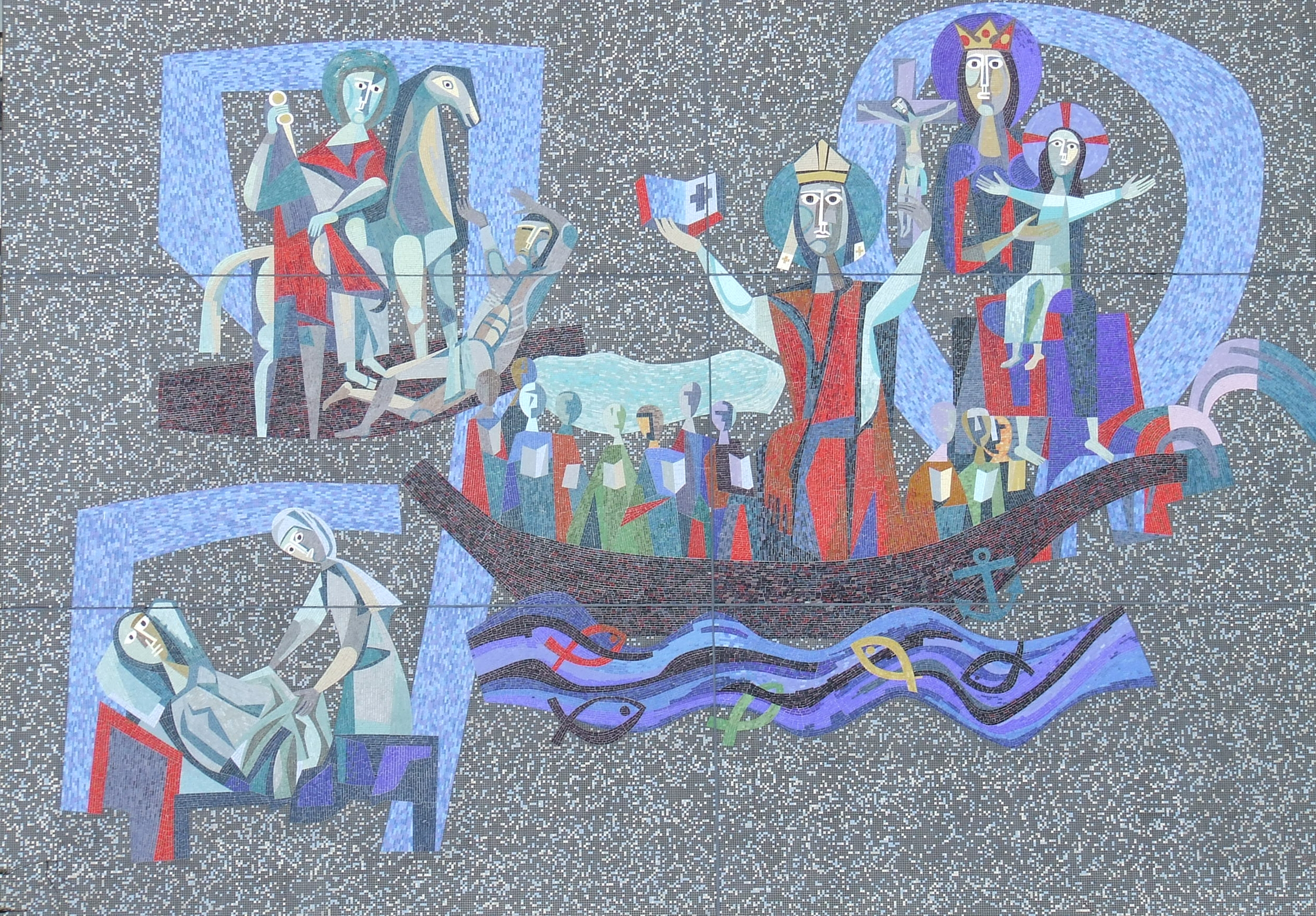 140 m² mozaïek door Daan Wildschut uit 1962/63 aan het voormalige Sint-Willibrordusziekenhuis (nu Martinushof) in Tegelen. Foto gemaakt door Sindala op 4 maart 2007.